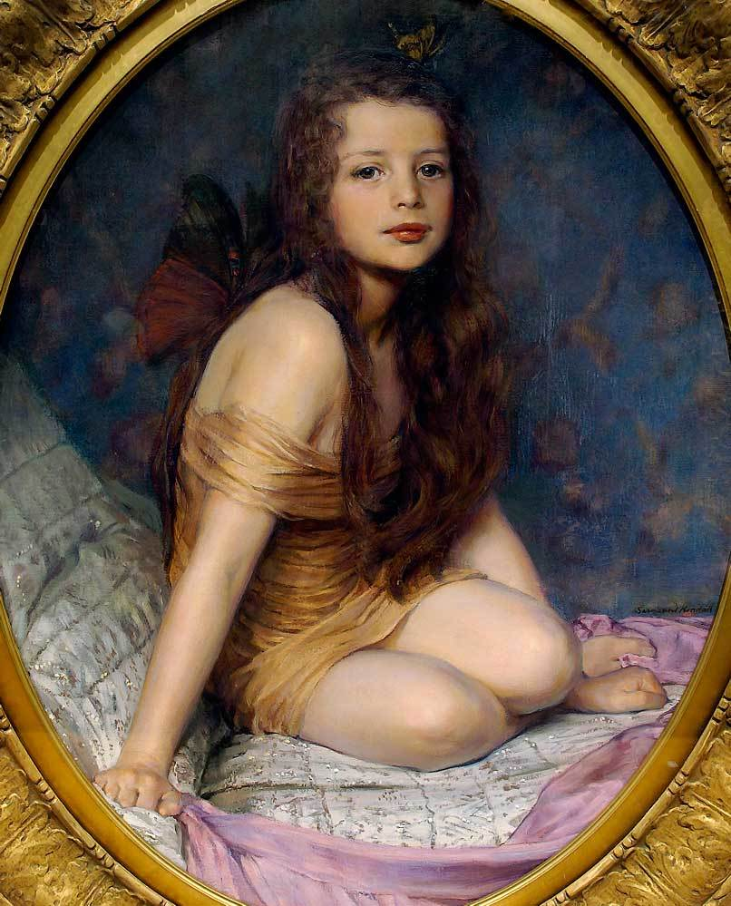 William Sergeant Kendall (1869-1938). Psyche. 1909